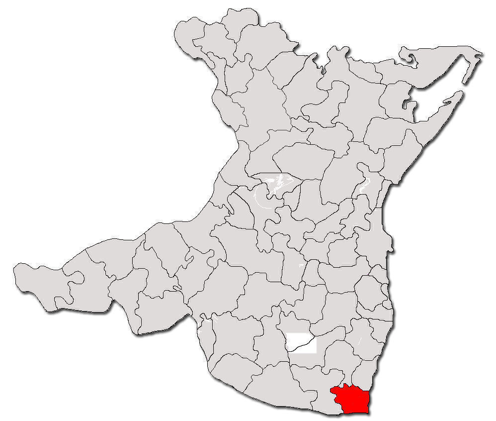 Volapük: Topam in ziläk: Constanţa.